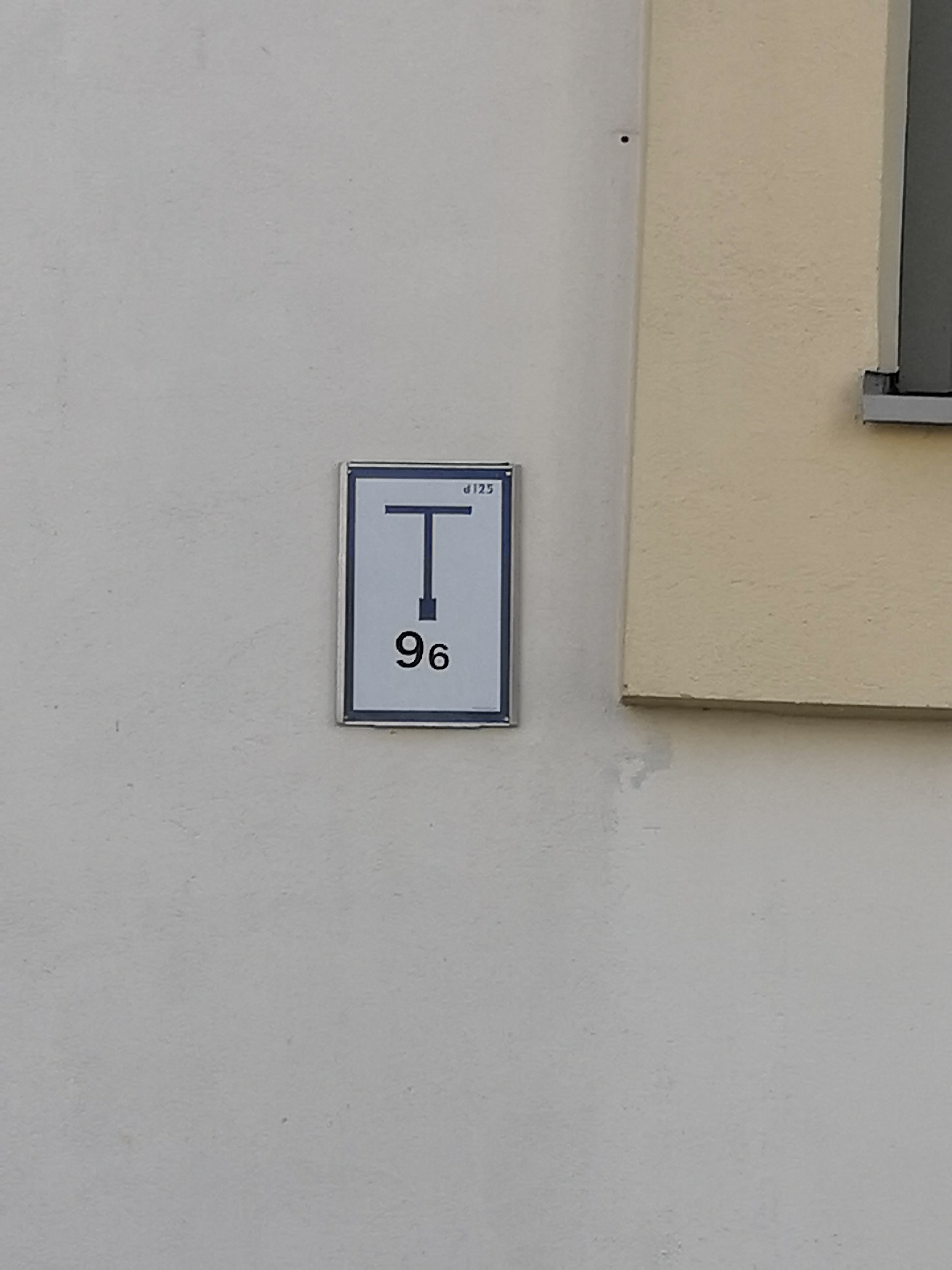 Suomalainen palopostimerkki Helsingin Taka-Töölössä. d125=putkilinjan paksuus millimetreinä. 9,6=palopostin etäisyys metreinä kohtisuoraan merkistä.